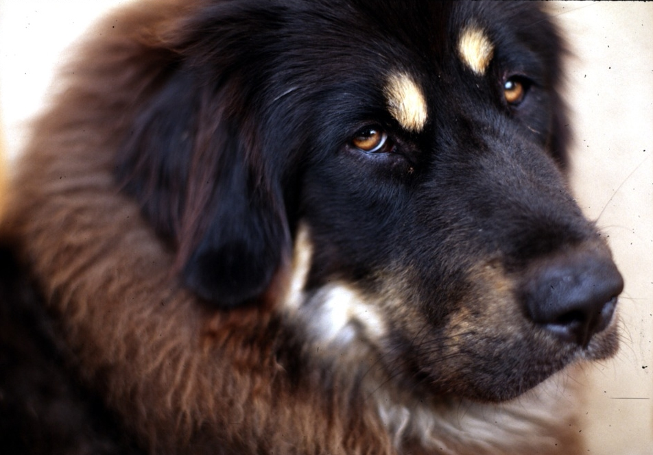 Tibetan Mastiff